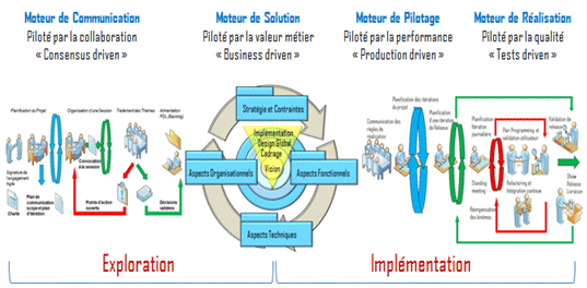 Structure méthode